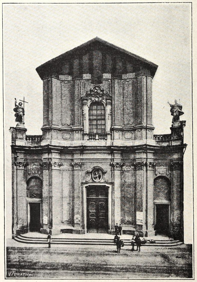 Facciata della chiesa di San Francesco da Paola in Milano, da l'Edilizia Moderna (1894)